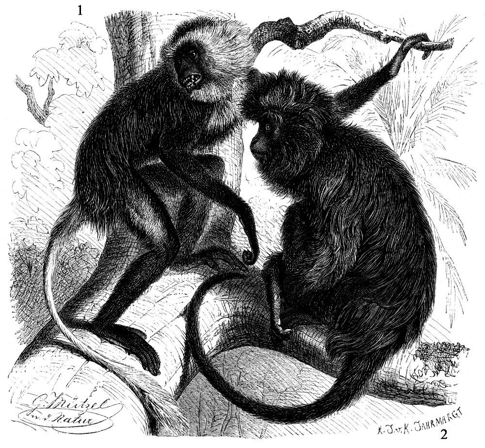 1 - Colobus polykomos, 2 - Colobus satanas